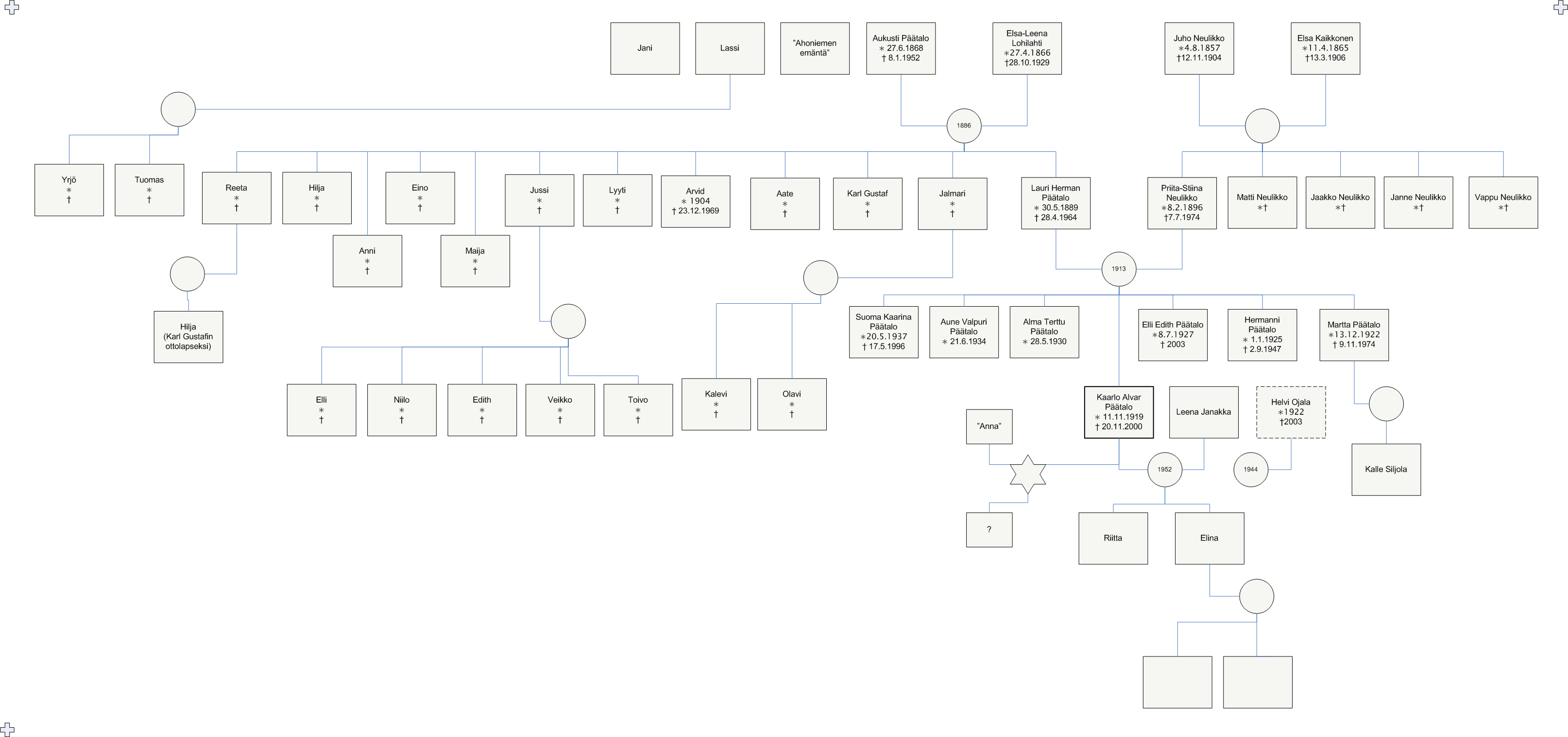 Kalle Päätalon sukupuu